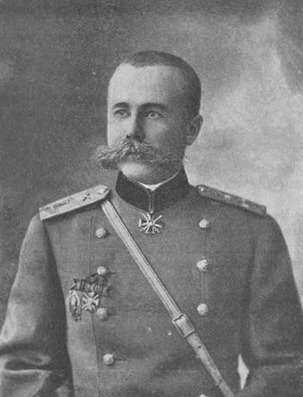 Алексей Алексеевич Маниковский, помощник военного министра: Чин/звание: «Генерал от артиллерии» Знаки различия на картине: погоны и звёзды «Генерал-лейтенант».